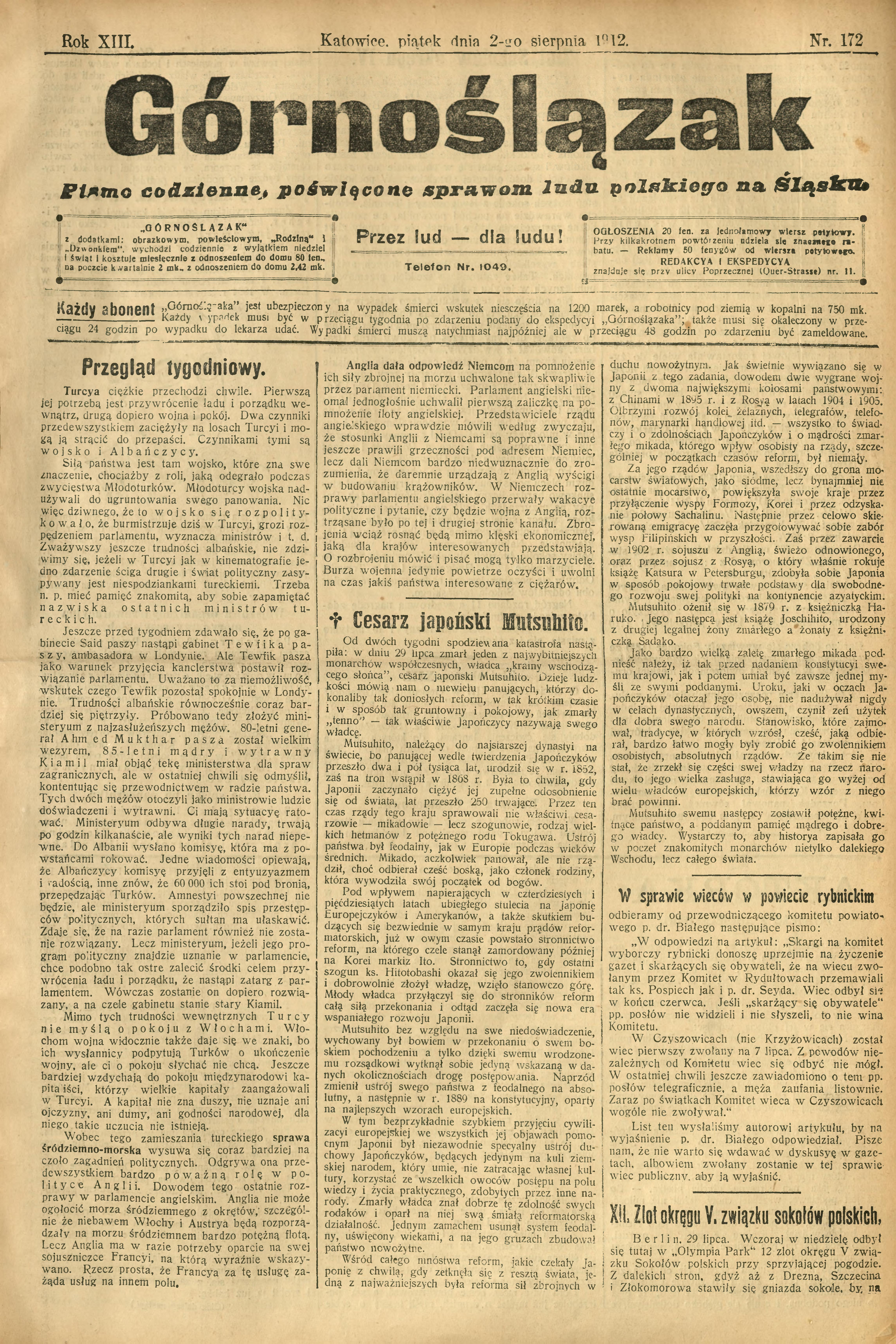 skan gazety PL